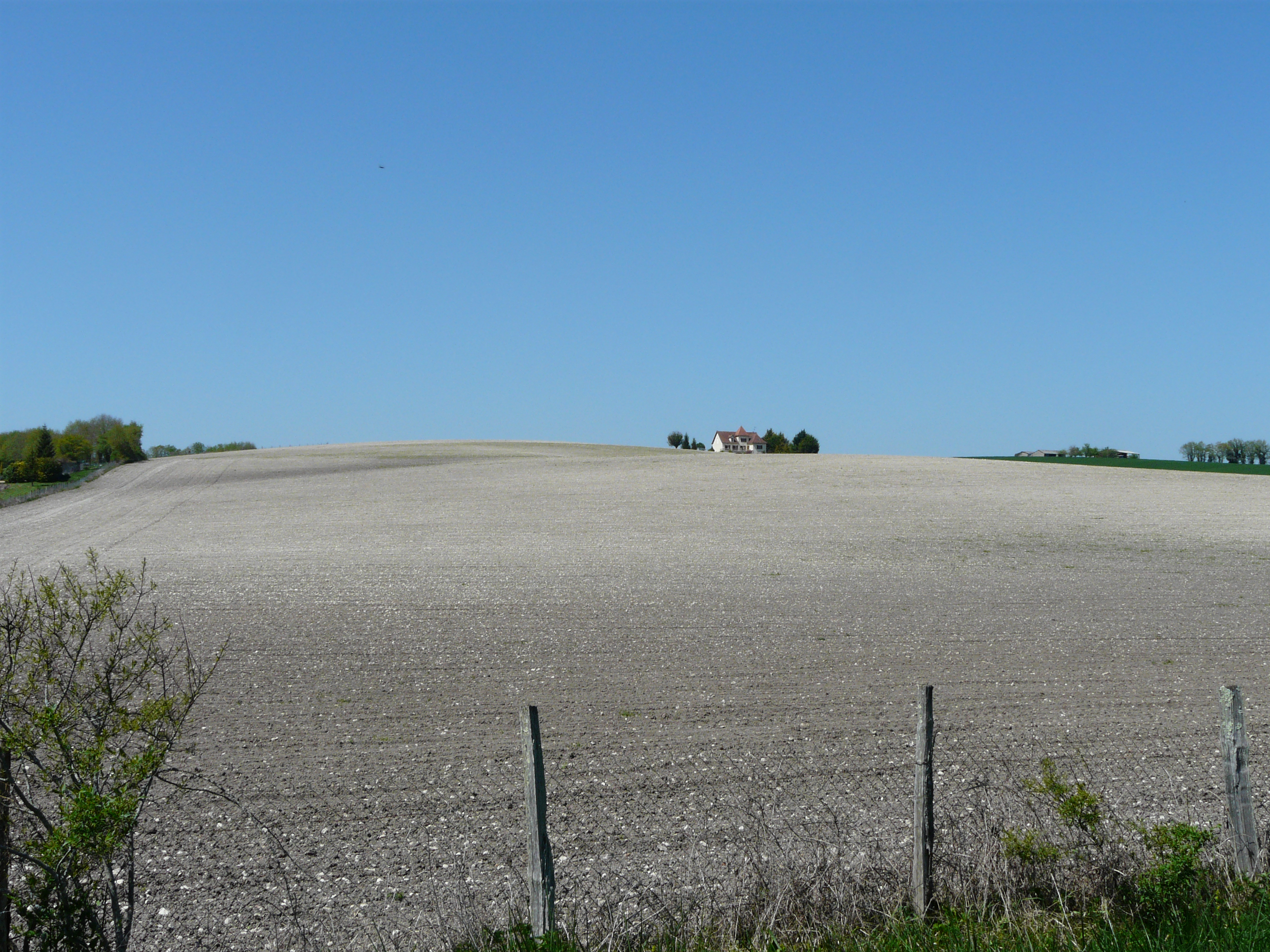 Champ récemment labouré à Cornille, Dordogne, France.